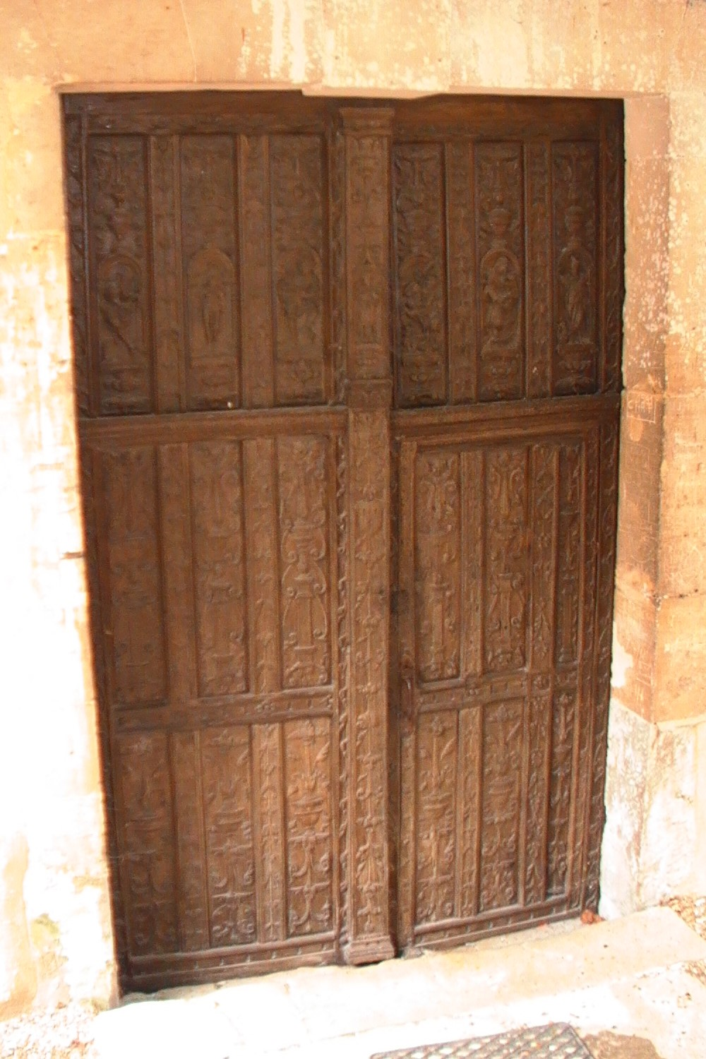 Eglise Saint-Georges d'Aubevoye - porte à double vantail en bois sculpté - datée de 1547